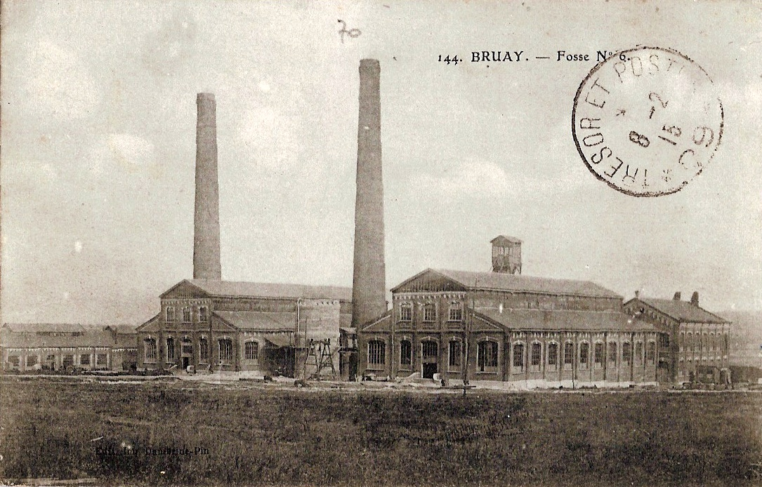 photo du 6 de Bruay datée de 1915